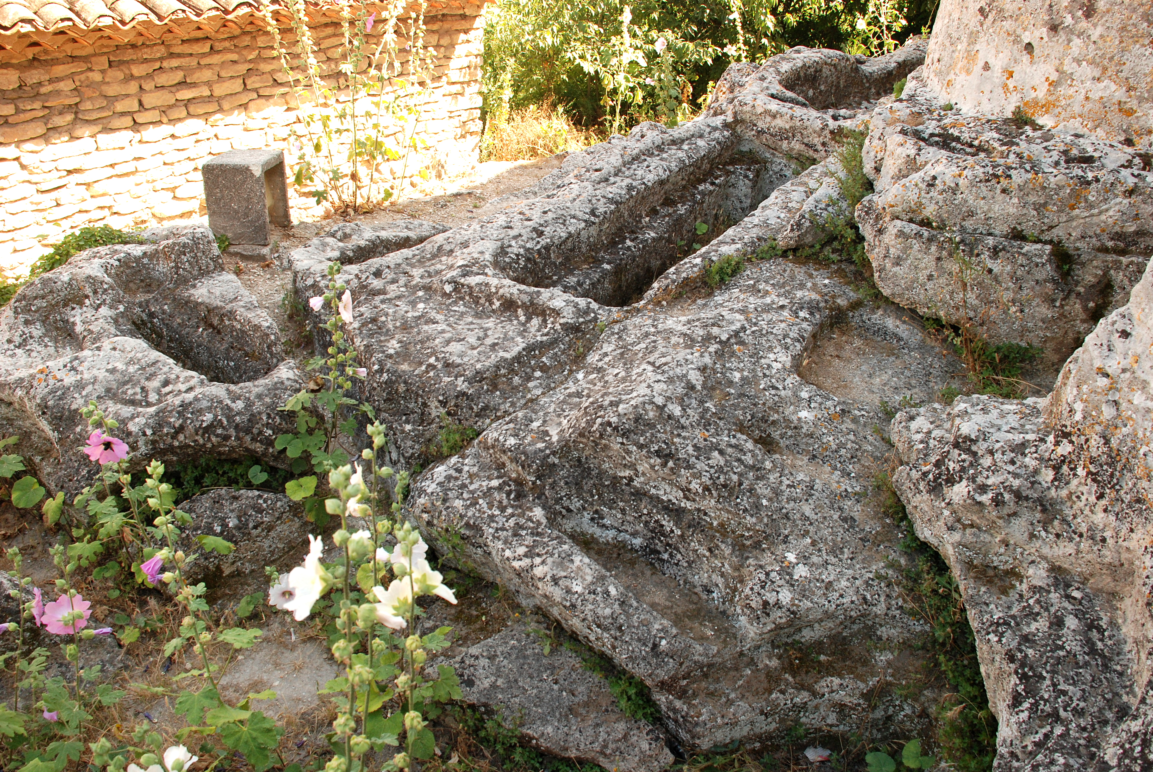 France - Provence - Vaucluse - Luberon - Église de Saint-Pantaléon